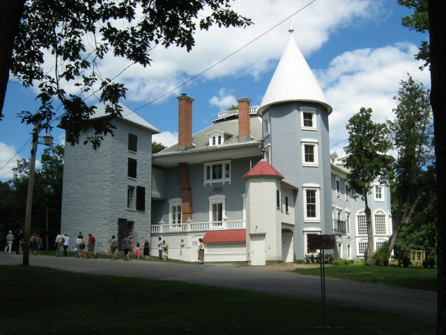 Le manoir Papineau en 2007